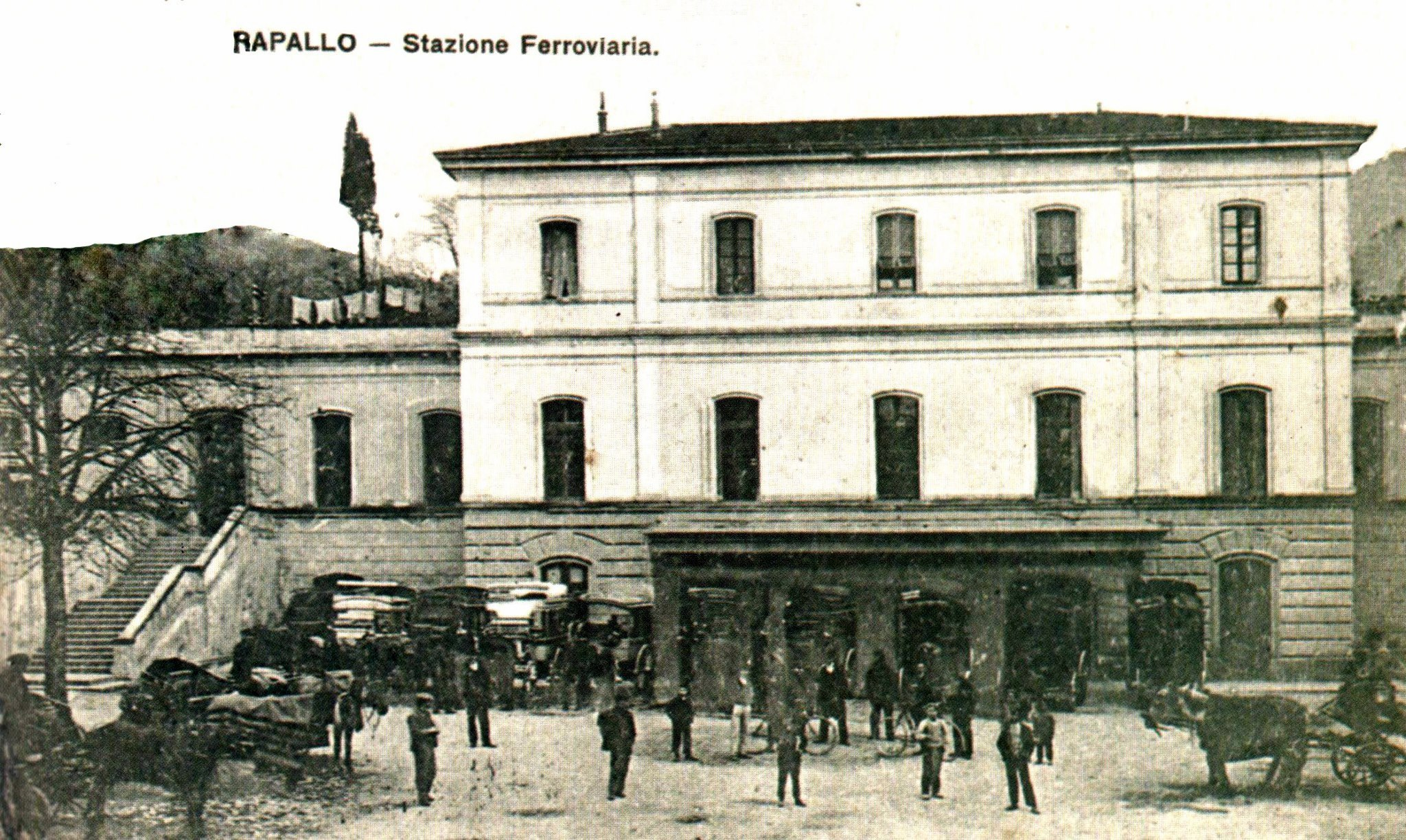 La stazione ferroviaria di Rapallo nel 1907, Rapallo, Liguria, Italia